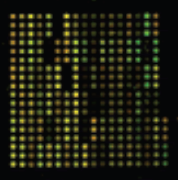 Parte de un microarray